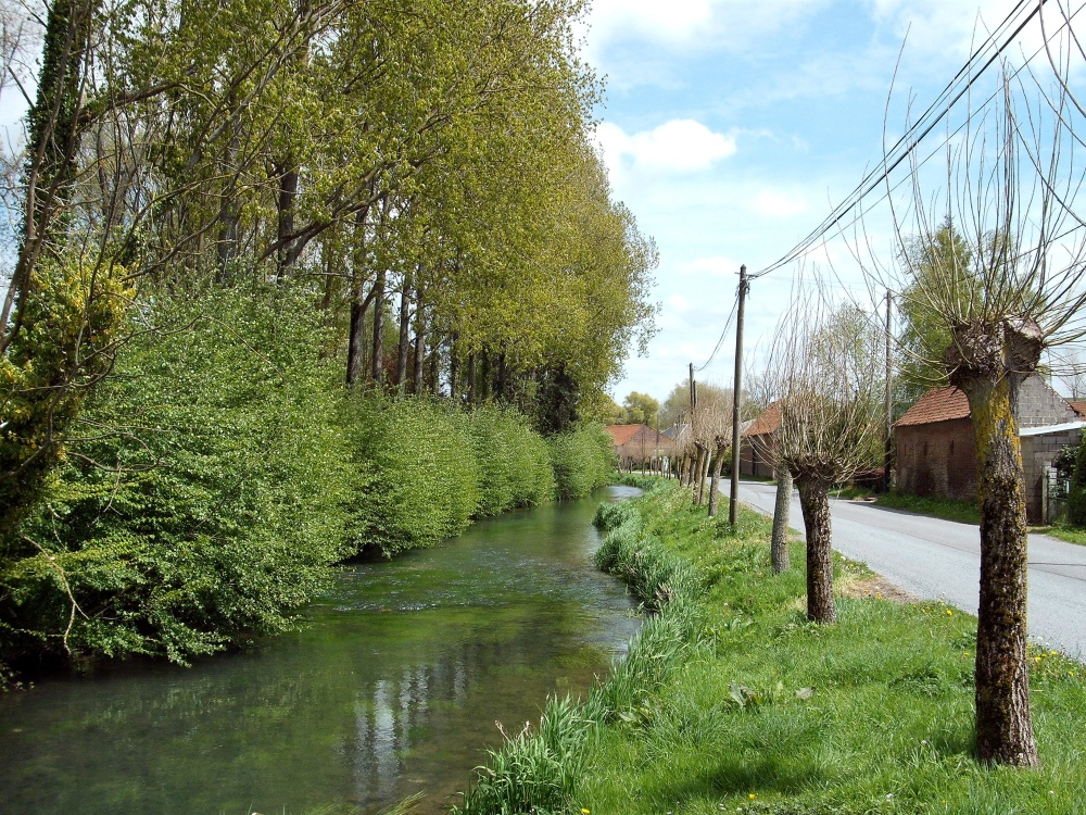 L'Aa - Renty